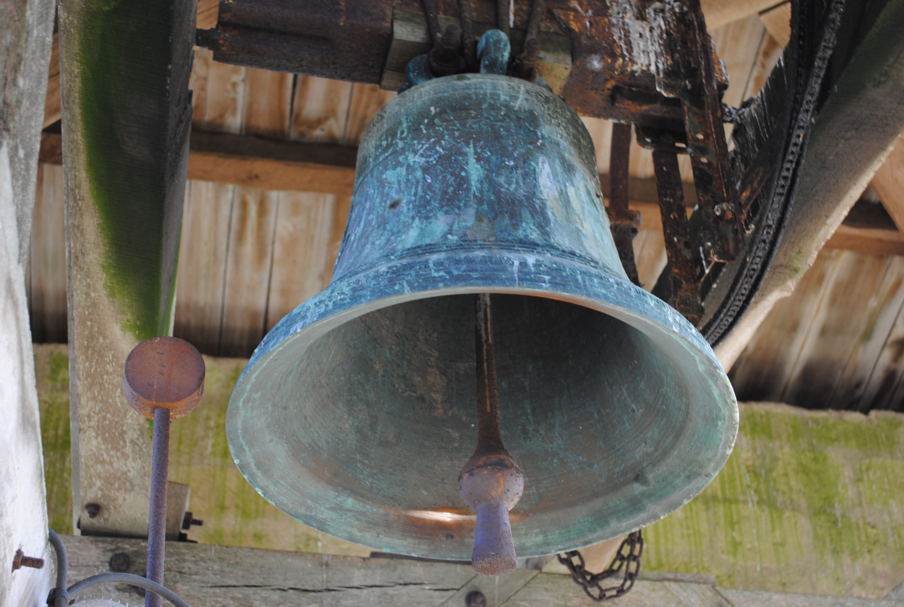 La cloche de l'Église.